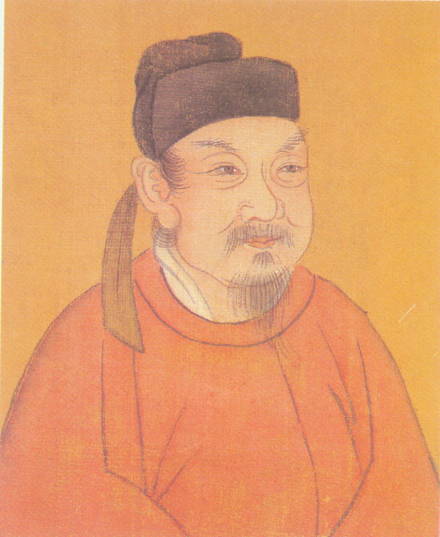 柳宗元肖像